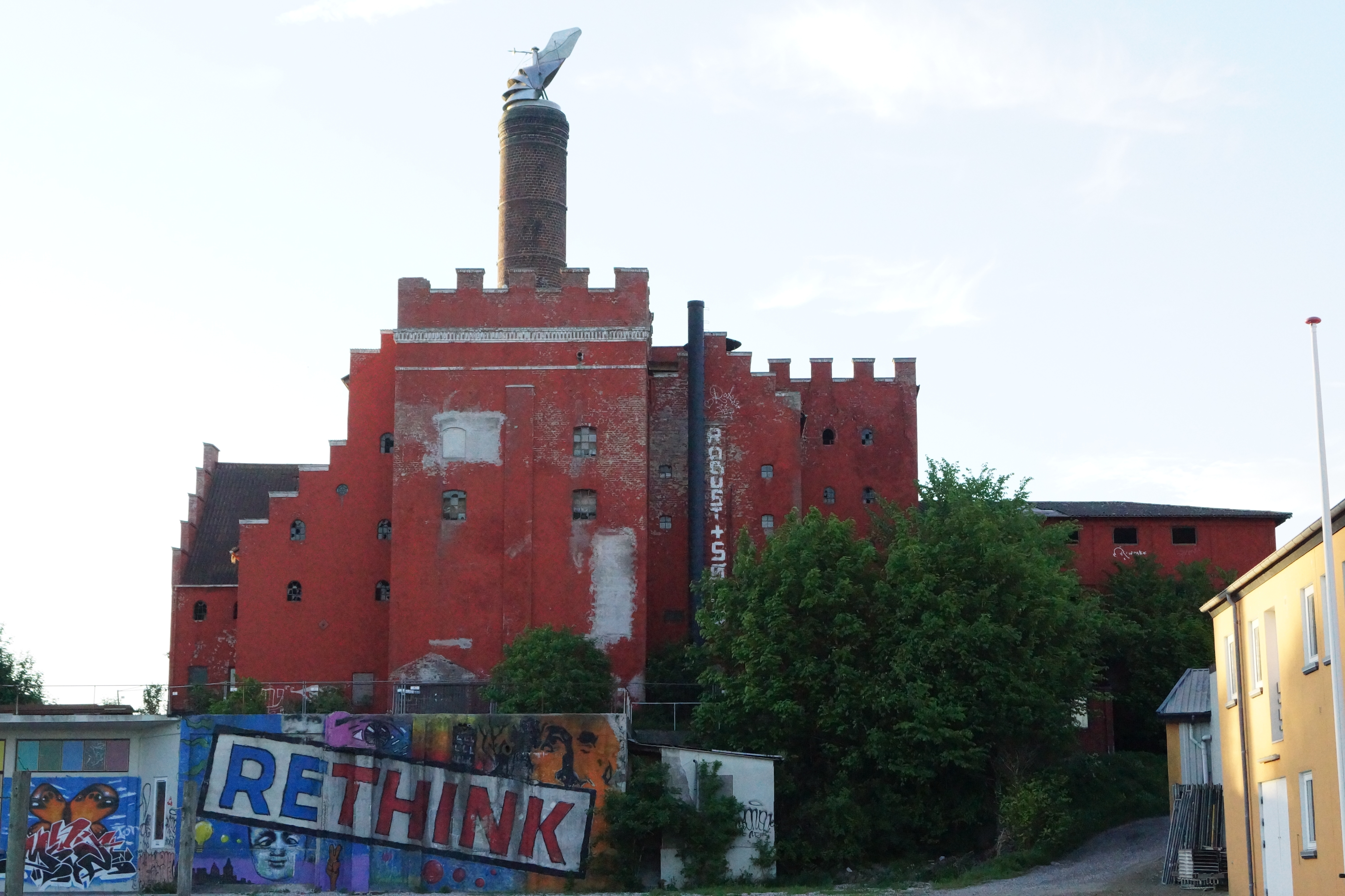 Maltfabrikken, Ebeltoft